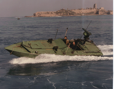 סירה חמושה בשימוש הקומנדו הימי הישראלי